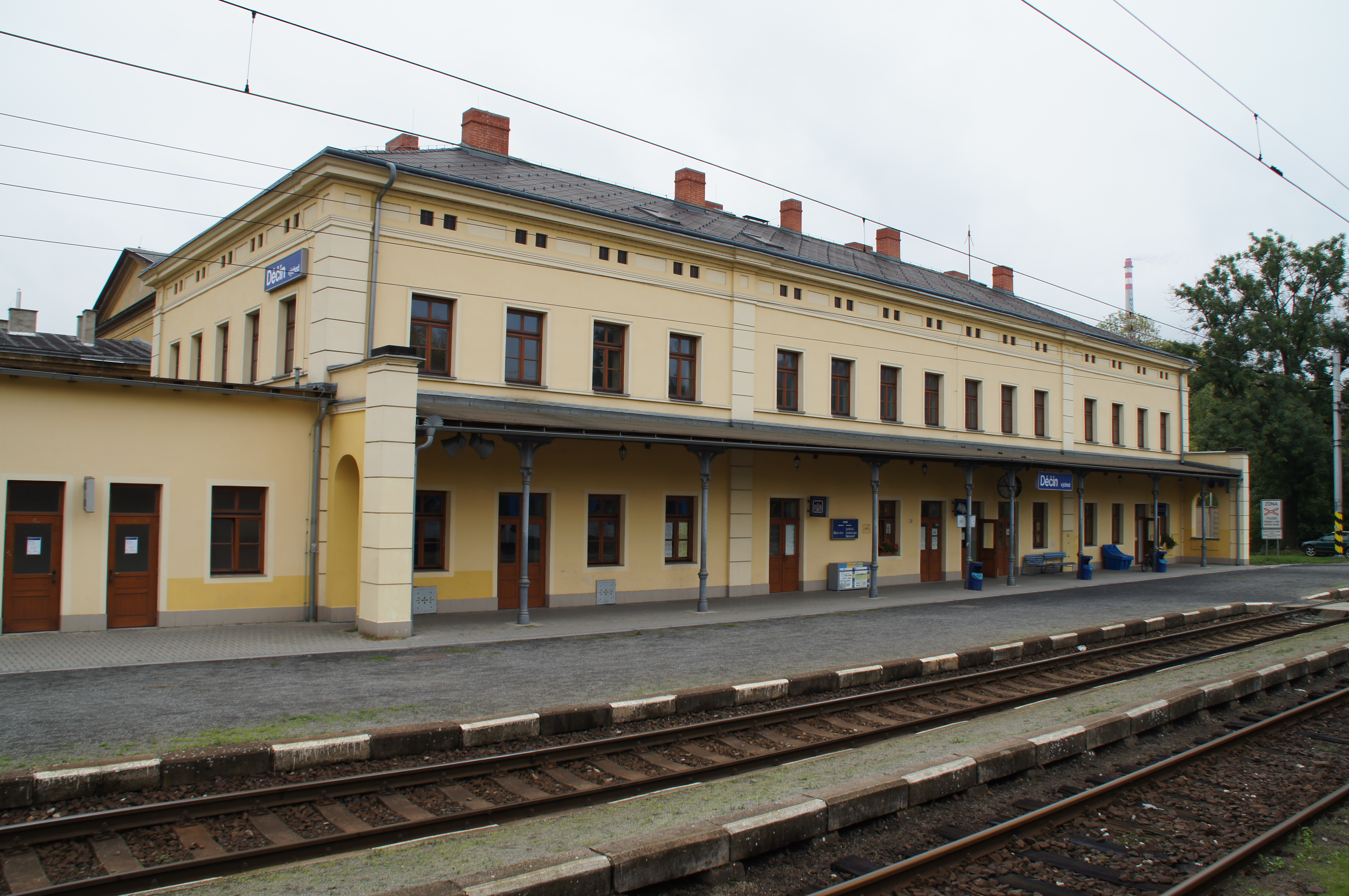 Der tschechische Bahnhof Děčín východ (Ostbahnhof, früher Tetschen Nordbahnhof) mit Bahnhofsgebäude, errichtet 1873 durch die österreichische Nordwestbahn, 17. listopadu 362/15; Architekten: Rudolf Frey, Konrad Wilhelm Hellwag.